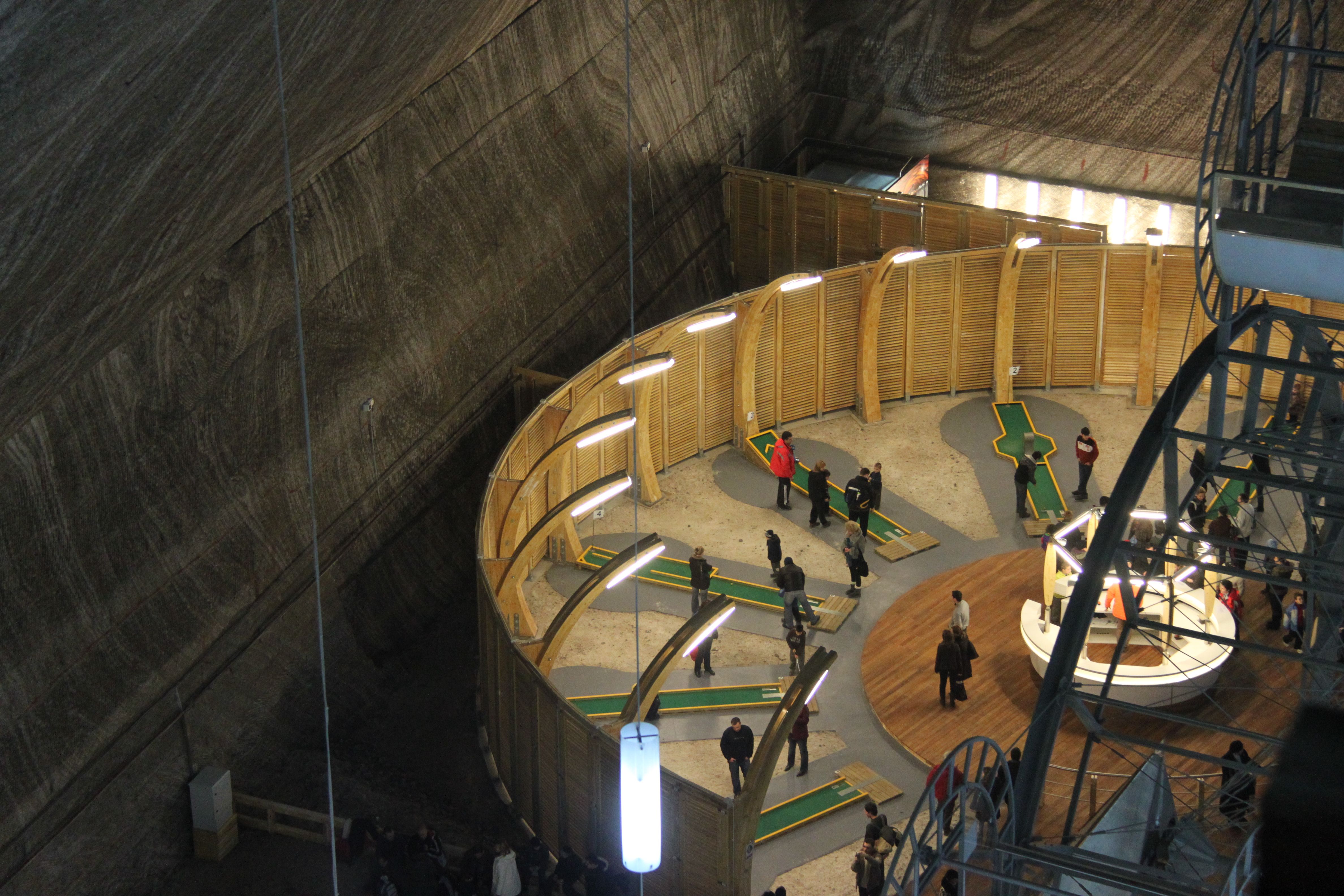 Salina Turda, mina Rudolf